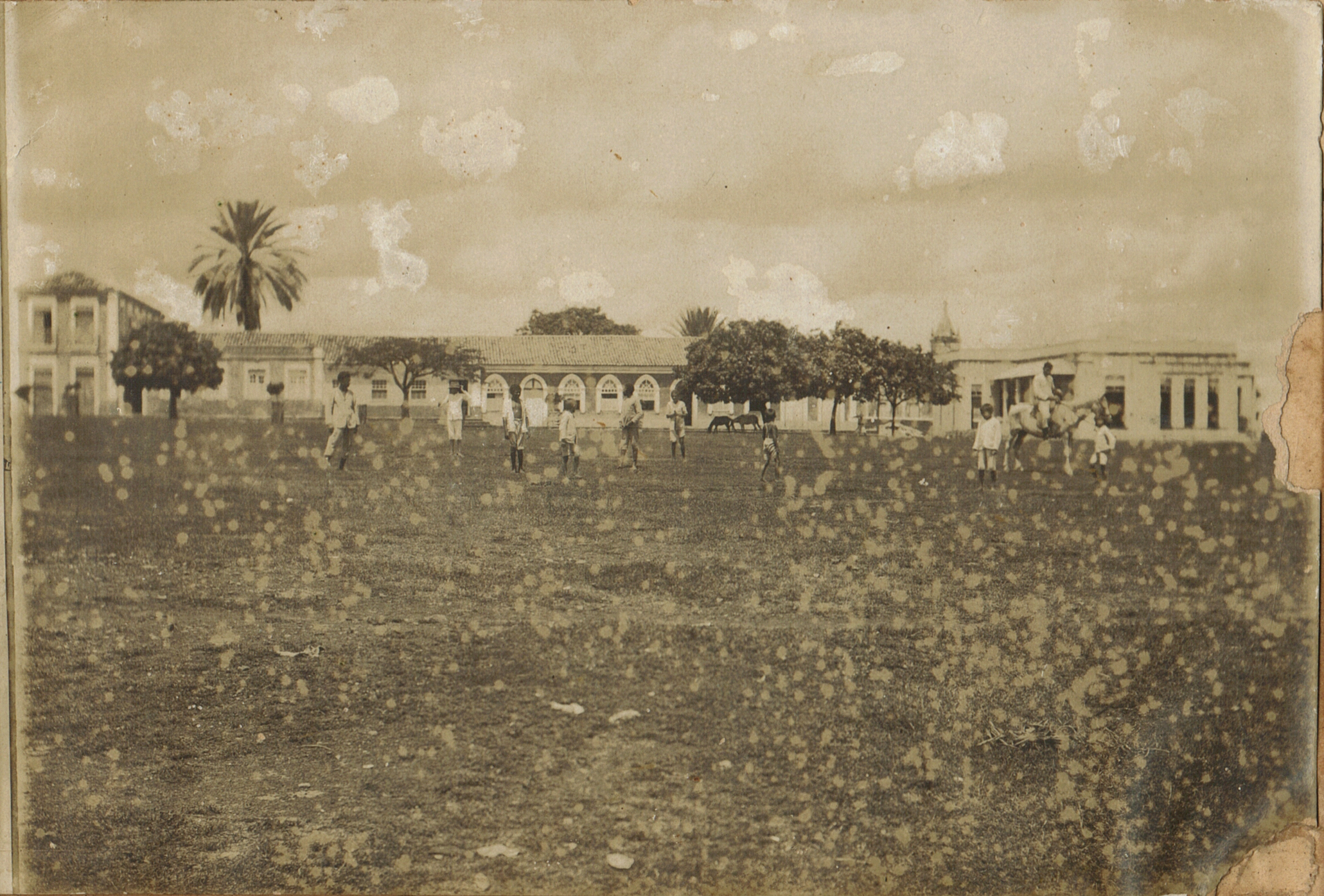 Vista da Praça Bona Primo em Campo Maior (Piauí) no dia 28 de junho de 1928.